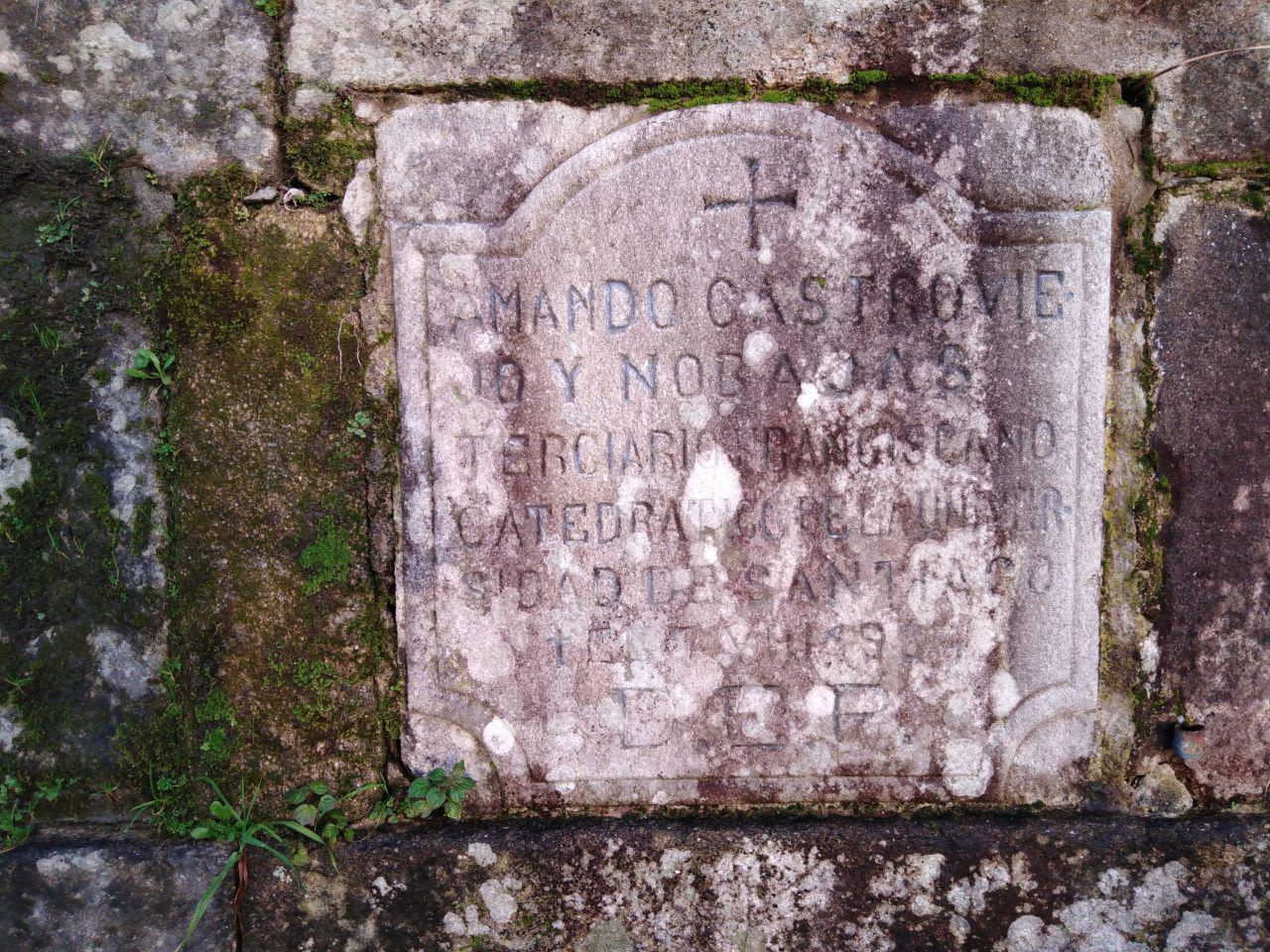 Tumba de Amando Castroviejo en Coiro, Cangas